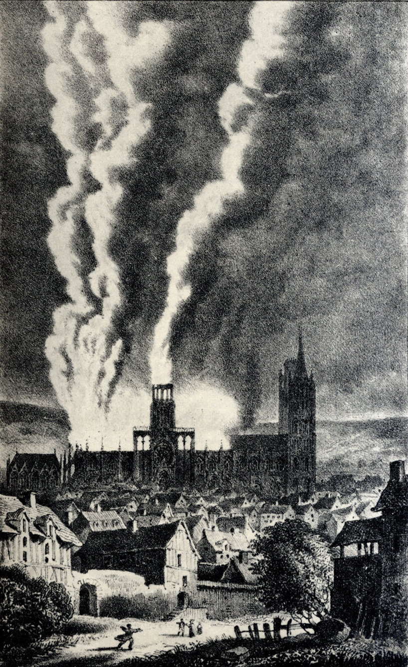 Incendie de la flèche par Polyclès Langlois (13-09-1822).